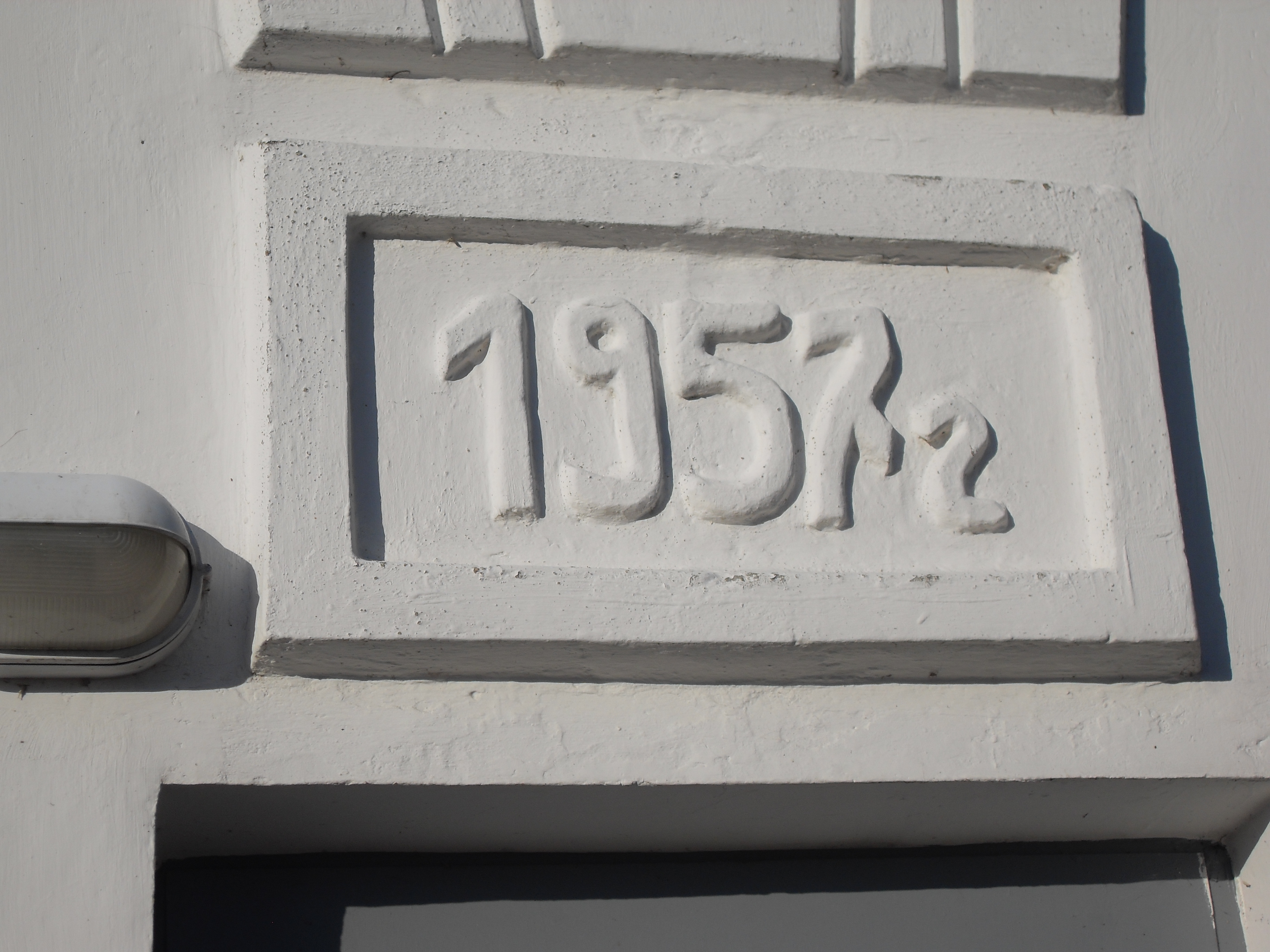 Маяк (3), Генічеський район, Бирючий острів